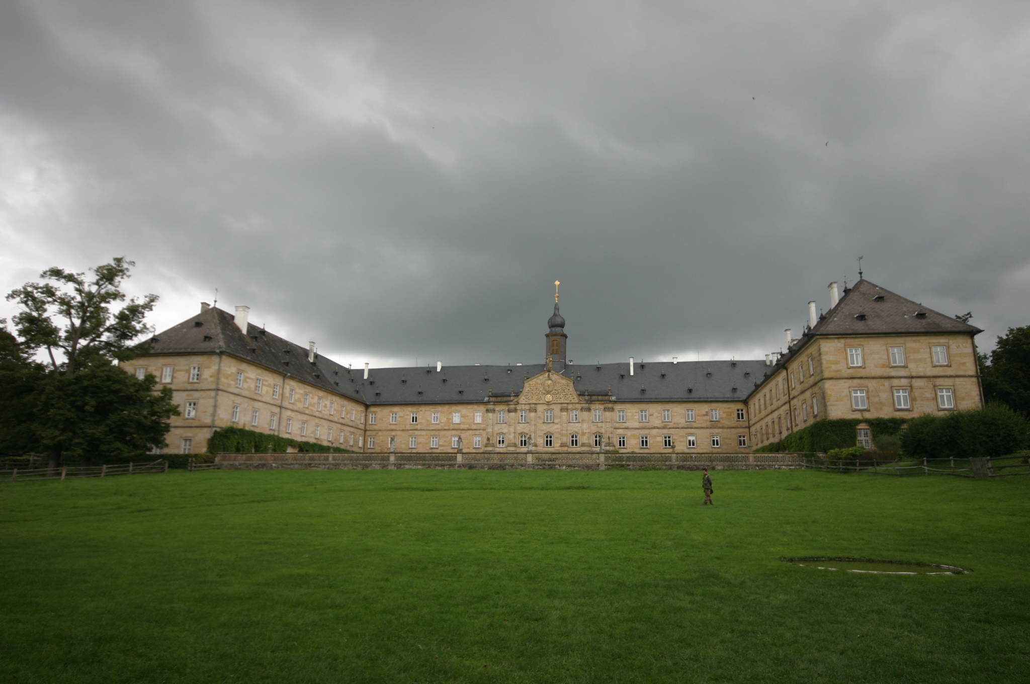 Gesamtansicht des Schlosses